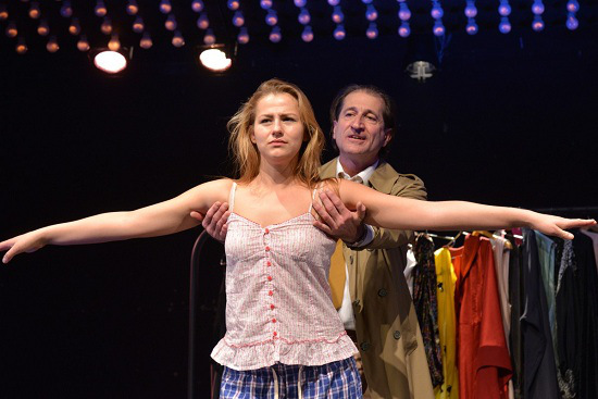 A Broadway felett az ég. Centrál színház. Szilágyi Csenge és Cserna Antal.